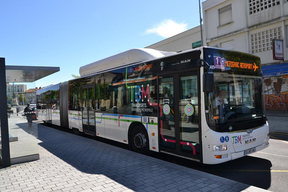 Bus de la lianes 1 avec nouvelle livrée TBM